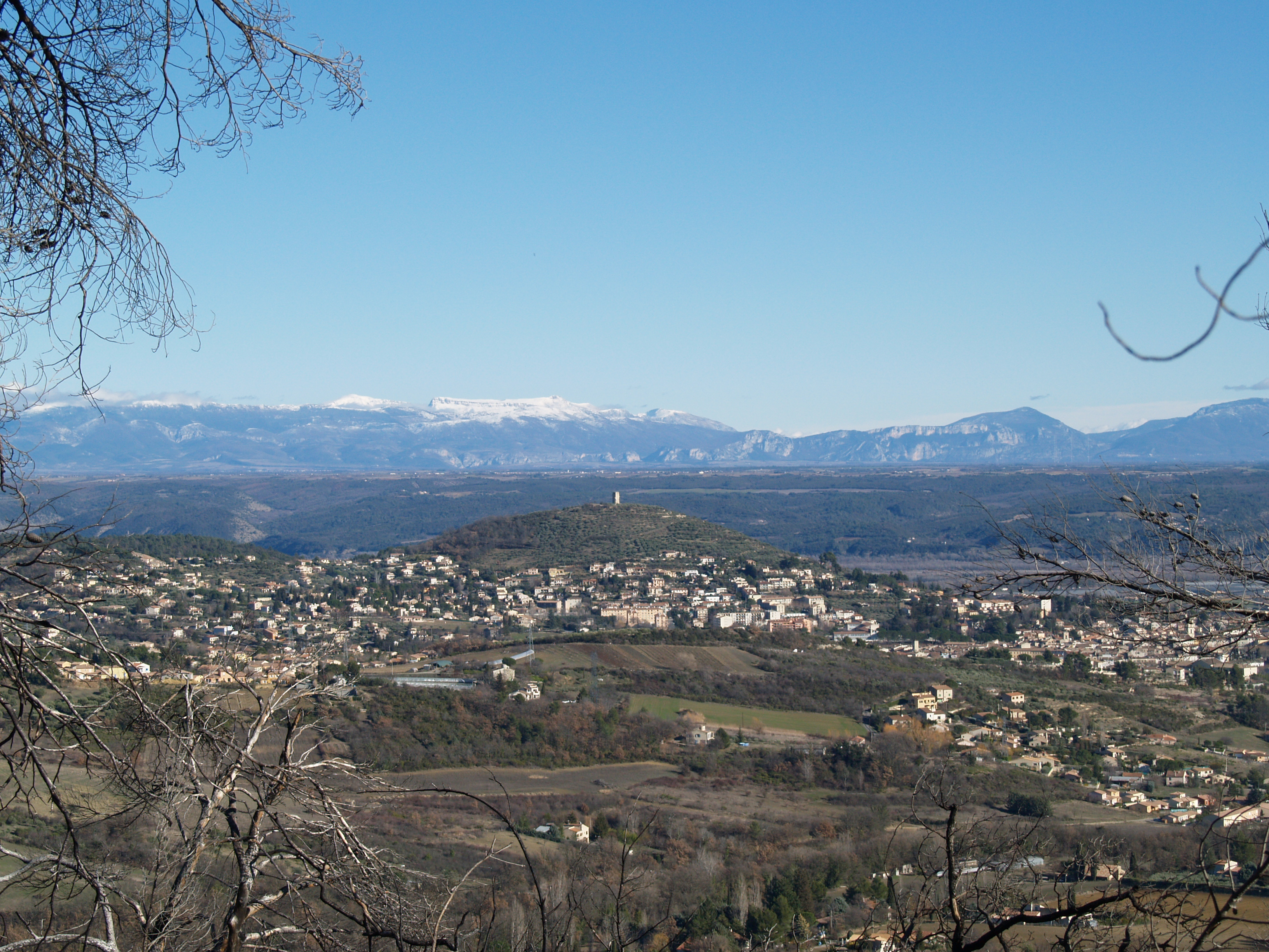 Vue générale de Manosque côté nord, vu de l'ouest. Les Alpes et le Parc naturel Verdon sont à l'horizon.